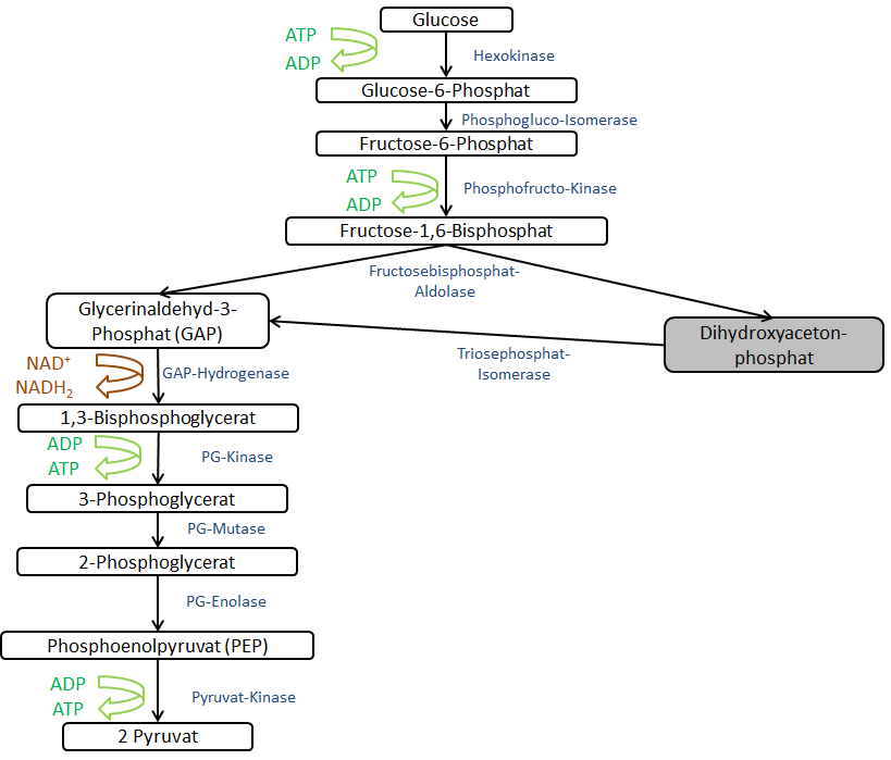 EMP-Weg mit Hervorhebung der Ausgangssubstanz zur biologischen Phosphorsäuregewinnung.